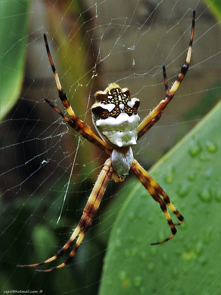 Araña Tigre (Argiope argentata) Reino: Animalia Filo: Arthropoda Clase: Arachnida Orden: Araneae Familia: Araneidae Género: Angiope